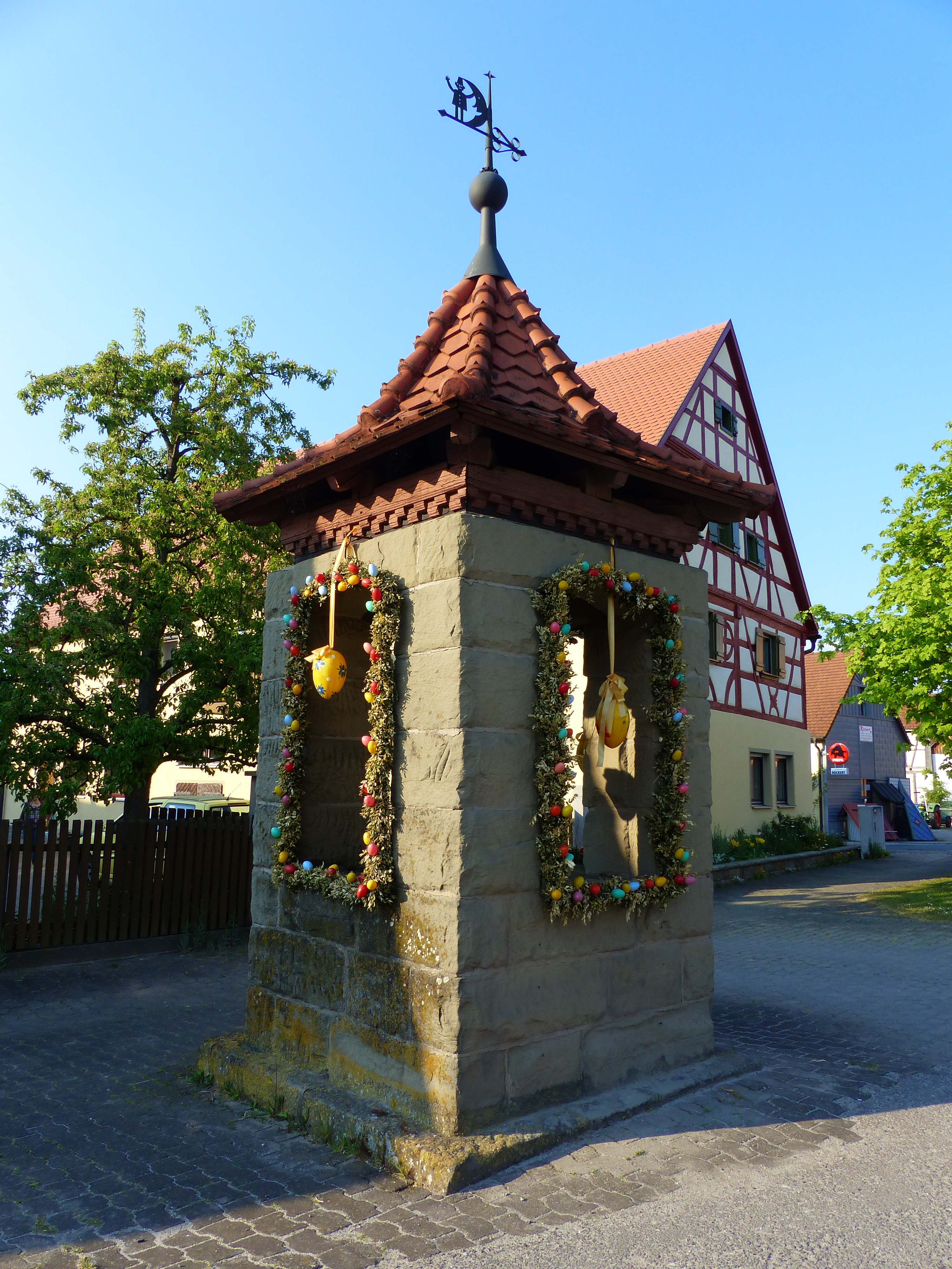 Osterbrunnen in Dietersheim, Mittelfranken